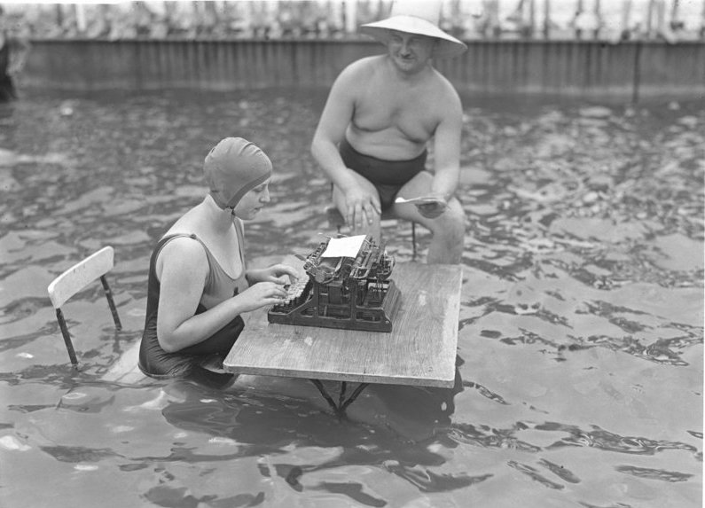 30 Grad Hitze! Das Büro im Wasser! Ein Kaufmann hat sich infolge der grossen Hitze mit seiner Sekretärin in das Wasser geflüchtet und diktiert dort seine Briefe.